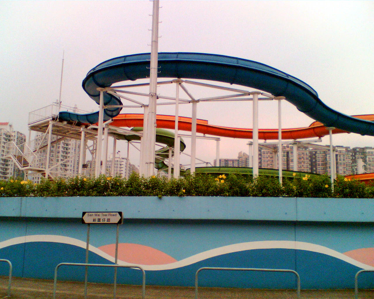 大埔游泳池滑水梯